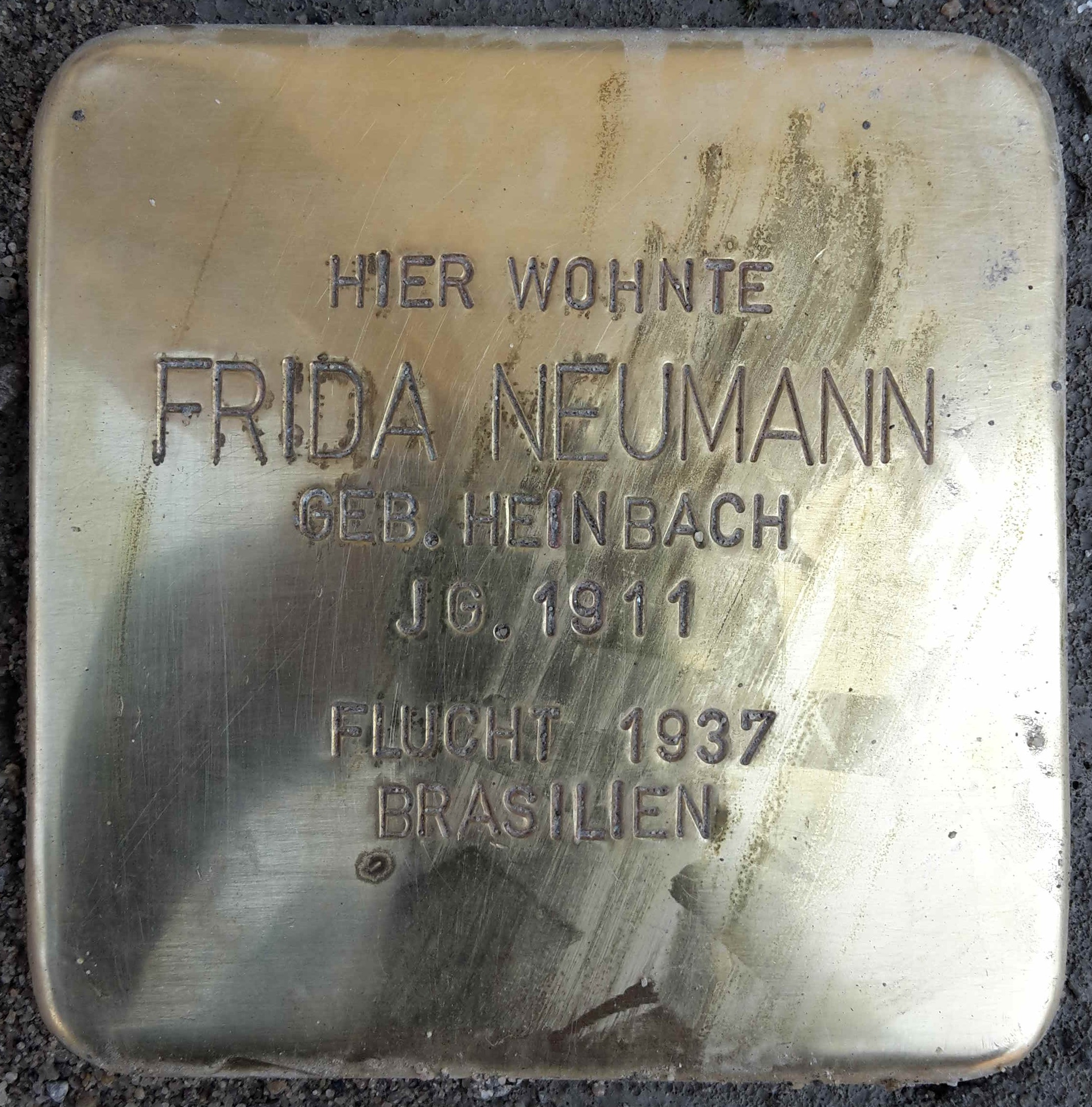 Stolperstein für Frida Neumann in Neu-Ulm